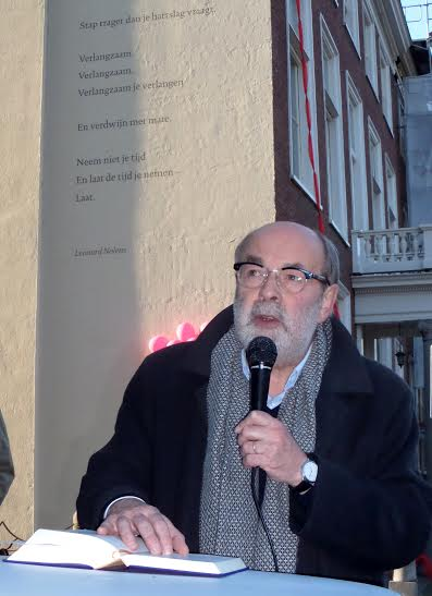 De Belgische dichter Leonard Nolens bij de onthulling van het muurgedicht "Laat", hoek Kanonstraat en Prinsessegracht, Den Haag (Nederland)